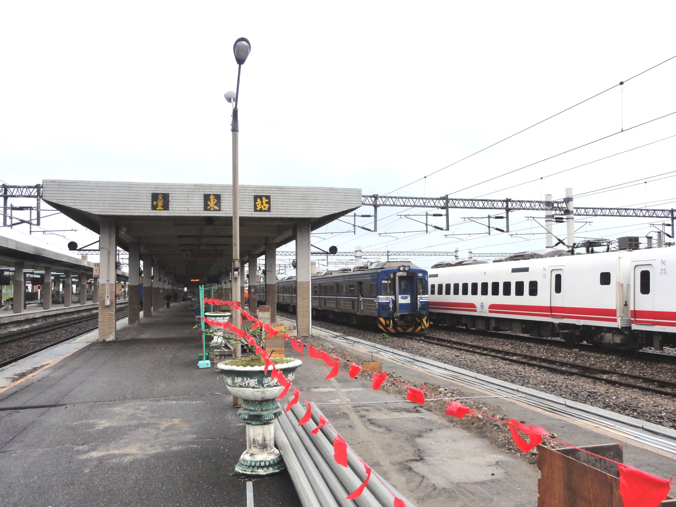 臺灣鐵路管理局臺東車站月台。